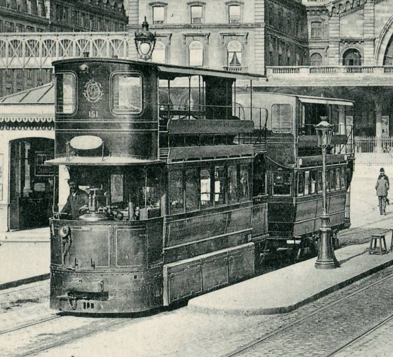 Tramway à air comprimé, système Mékarski, de la CGO modèle 1900